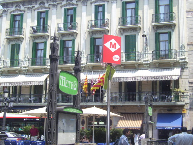 Entrance to Liceu metro station, Barcelona/Entrada a l'estació Liceu del metro de Barcelona